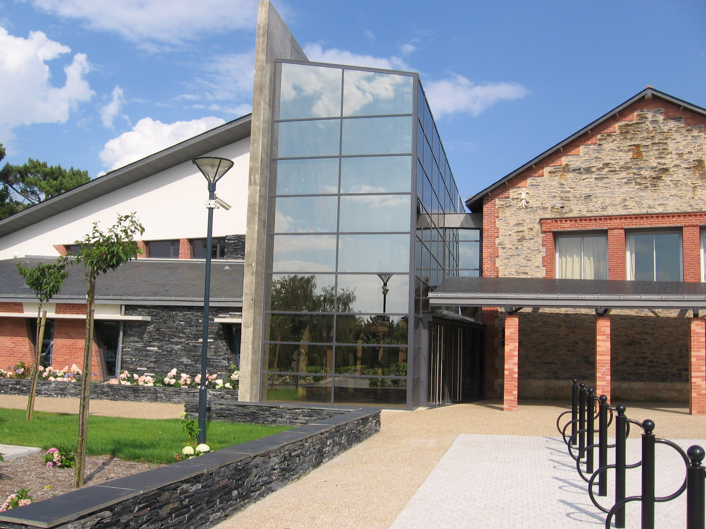 Médiathèque municipale Hervé-Bazin de Trélazé (Maine-et-Loire, France).